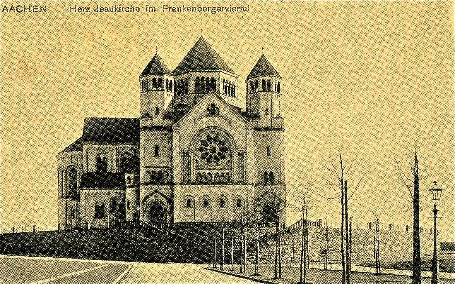 Die Kirche Herz-Jesu im Frankenberger Viertel in Aachen-Burtscheid kurz nach der Fertigstellung